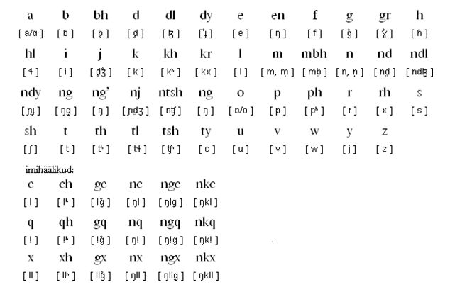 koosa keele häälikud